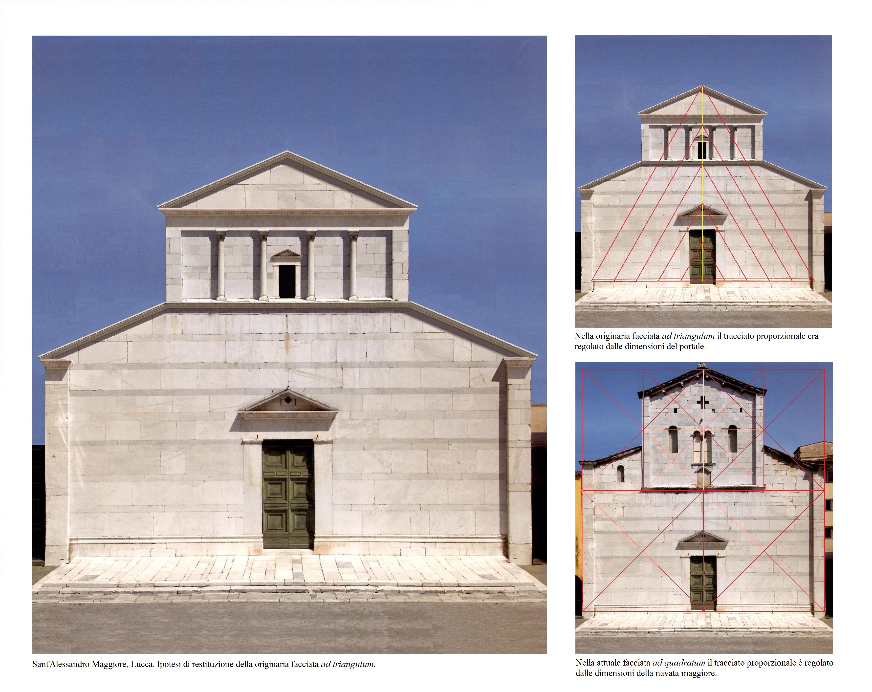 Sant'Alessandro, Lucca. Restituzione della facciata originaria ad triangulum e confronto con l'attuale facciata ad quadratum.